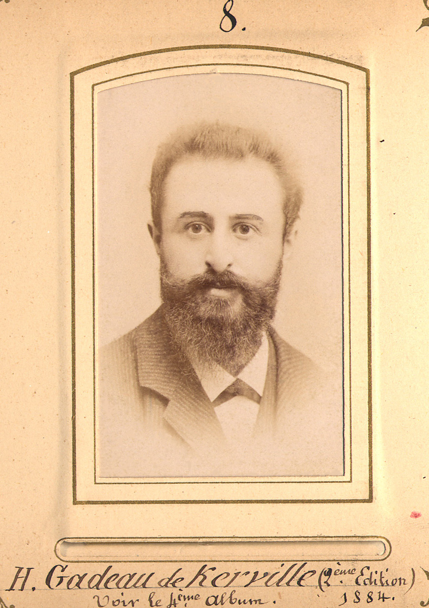 Portrait d'Henri Gadeau de Kerville (1858-1940).